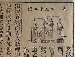 《化学鉴原》第192图